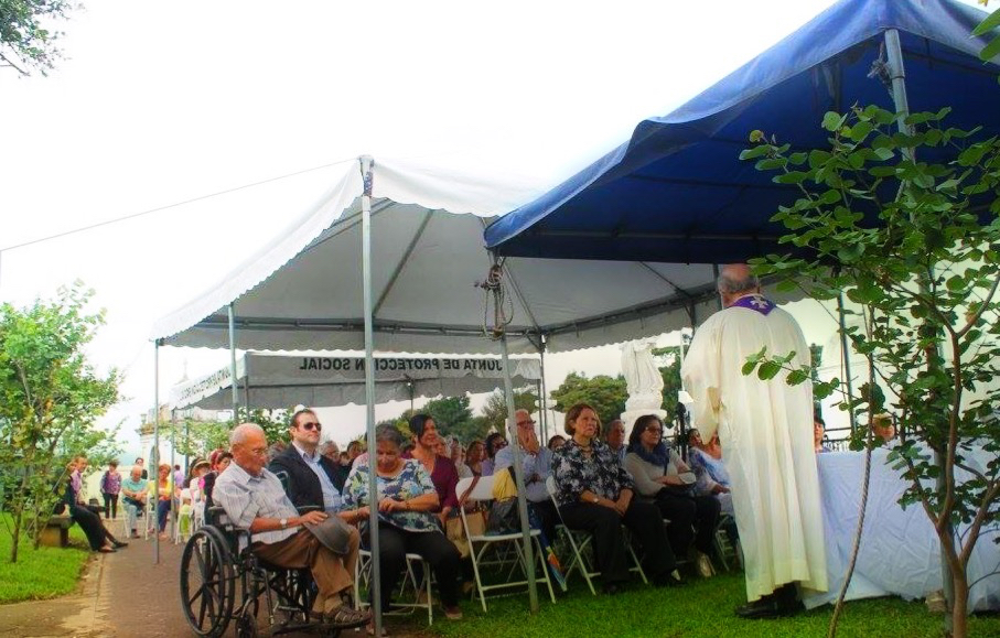 Misa de la comunidad italiana en Costa Rica, celebrada en el Cementerio General de San José, durante el Día de los Difuntos.